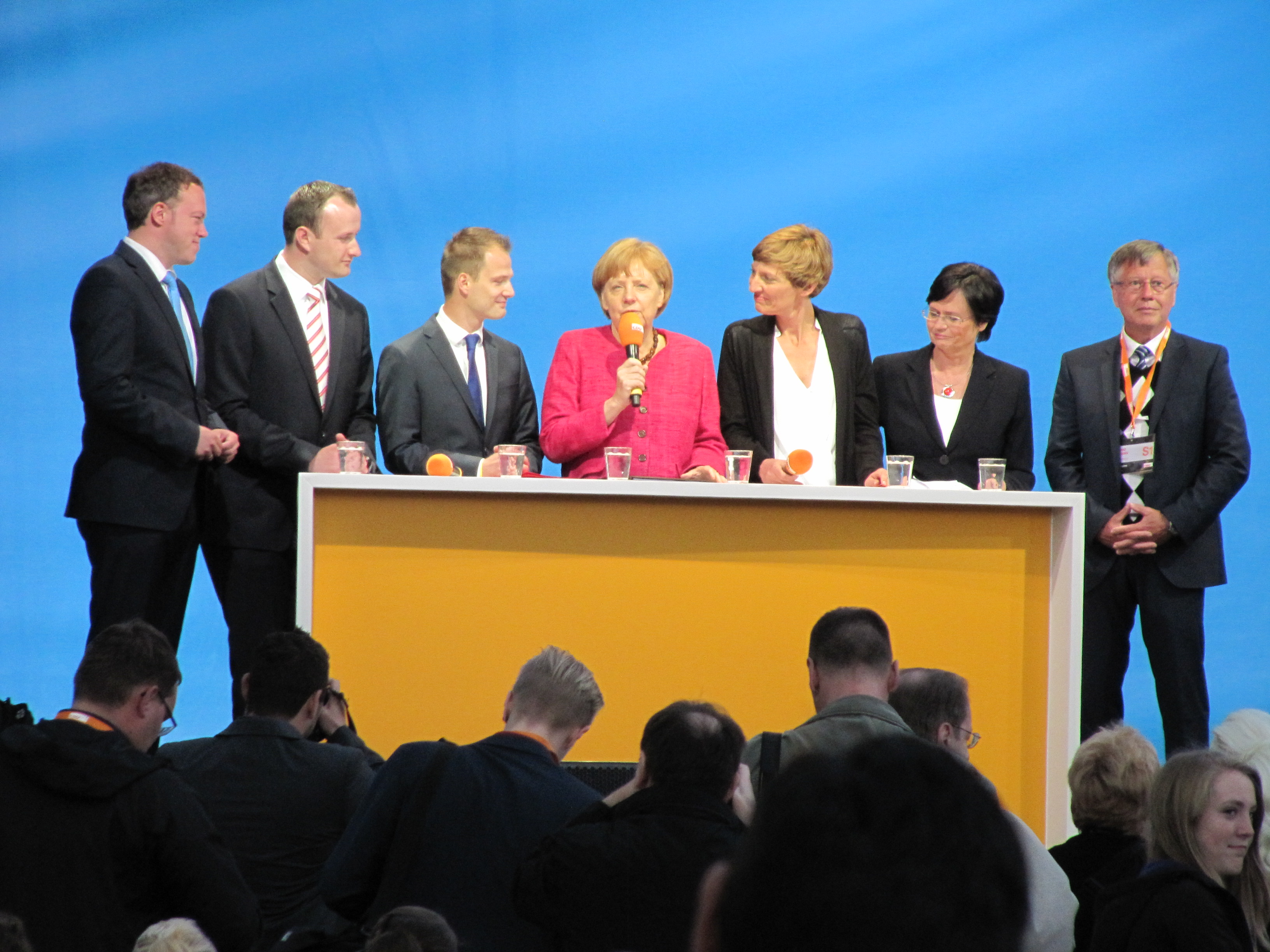 Thomas Fügmann (rechts) in Schleiz auf einer CDU-Wahlkampfveranstaltung zur Landtagswahl in Thüringen, zusammen mit Angela Merkel (Mitte) und Christine Lieberknecht (Zweite von rechts)